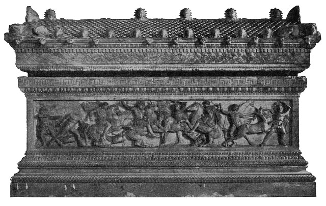 Sogenannter Alexandersarkophag Es handelt sich hierbei nicht um den Sarkophag Alexanders des Großen. Der Name rührt daher, dass auf dem Sarkophag Zahlreiche Schlacht- und Jadgszenen mit Alexander dem Großen dargestellt sind. 1887 in Sidon gefunden; auf der einen Langseite eine Jagd, auf der anderen ist die Schlacht bei Issos dargestellt.